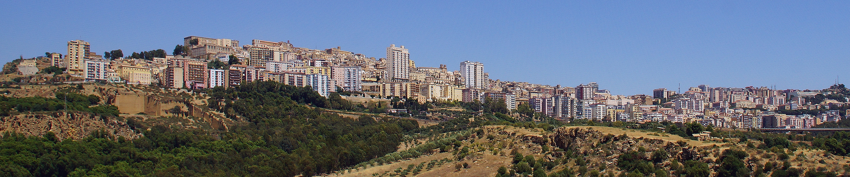 Panorama der Stadt Agrigent (von Südwesten), Sizilien, Italien - Foto 2014 Wolfgang Pehlemann